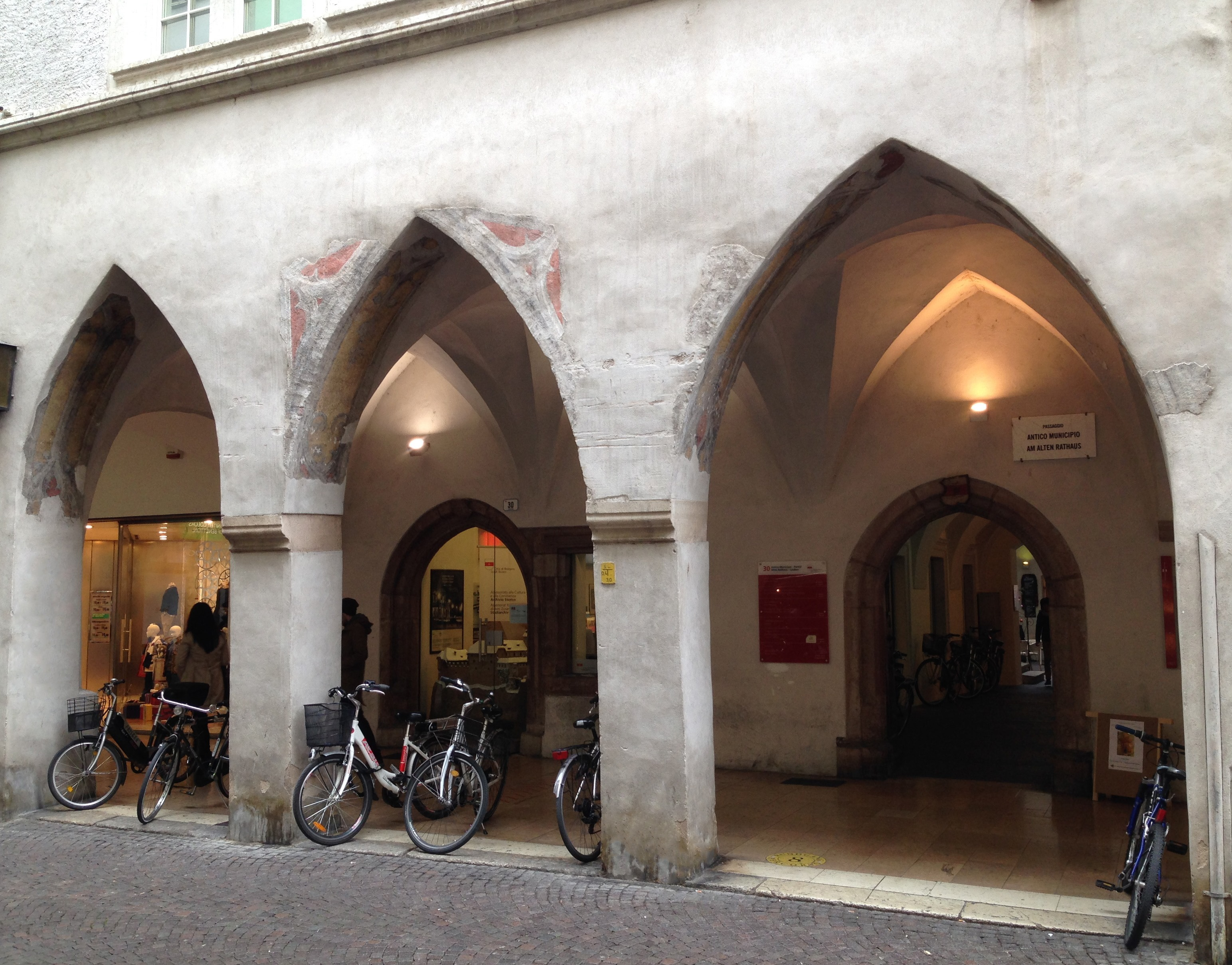 Altes Rathaus in Bozen - Südseite in den Lauben